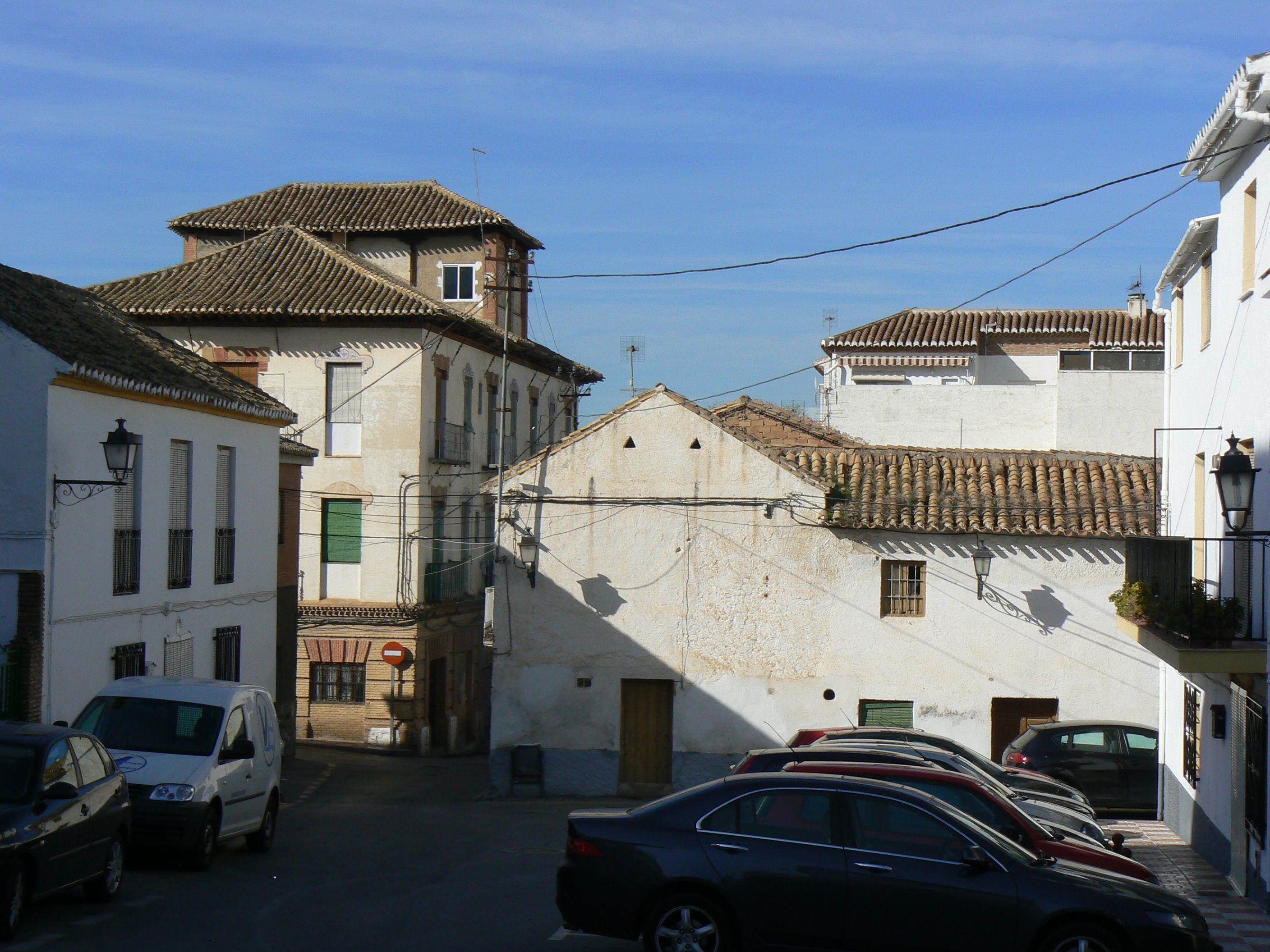 Foto de las Calle de las Cruces. Se aprecian en ella antiguas casas del pueblo de La Zubia.